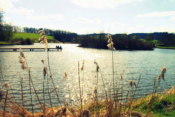 Der Stausee wurde im April 2012 von Thomas Hofinger fotografiert.